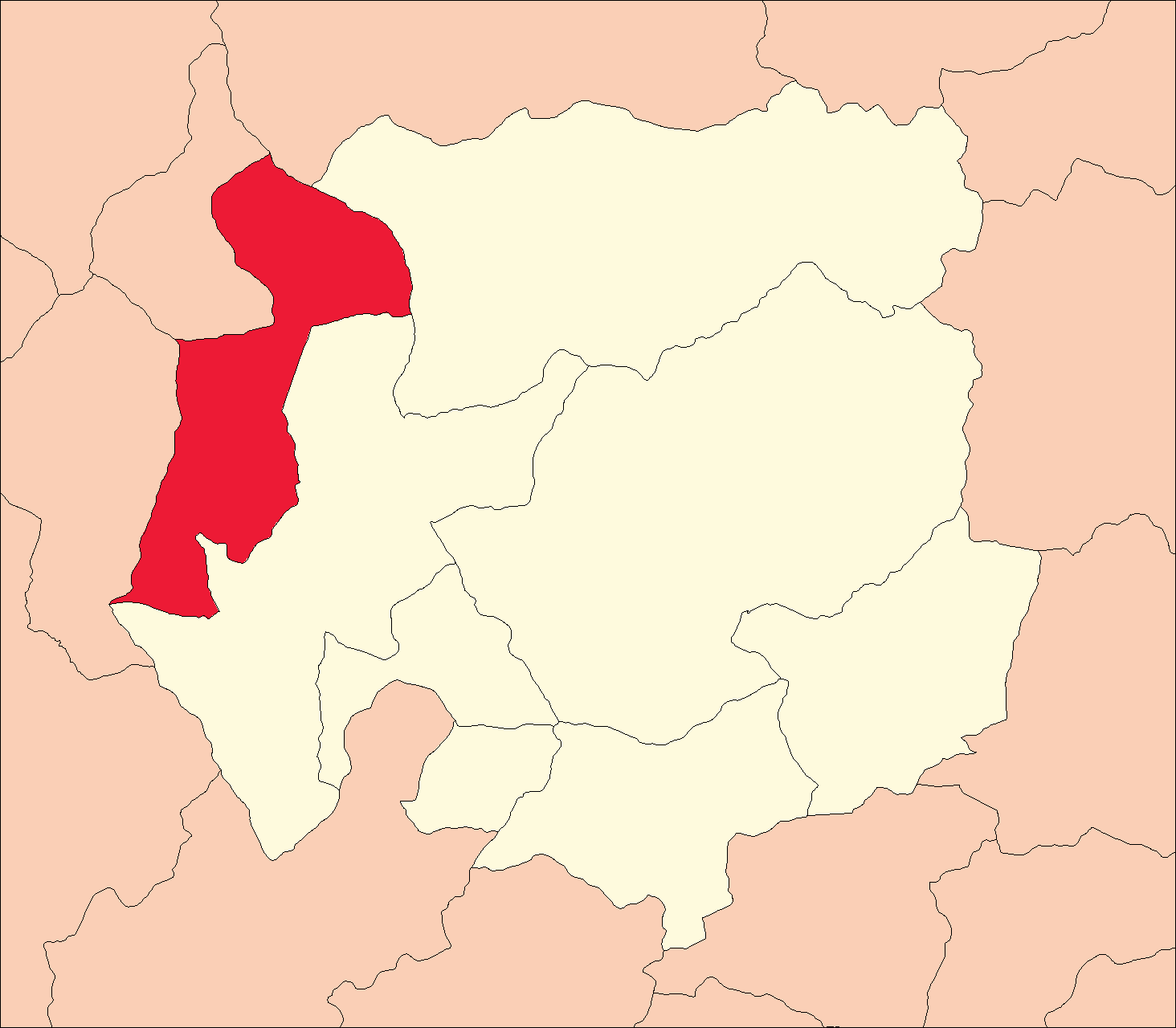 Ubicación del distrito de Pampamarca.